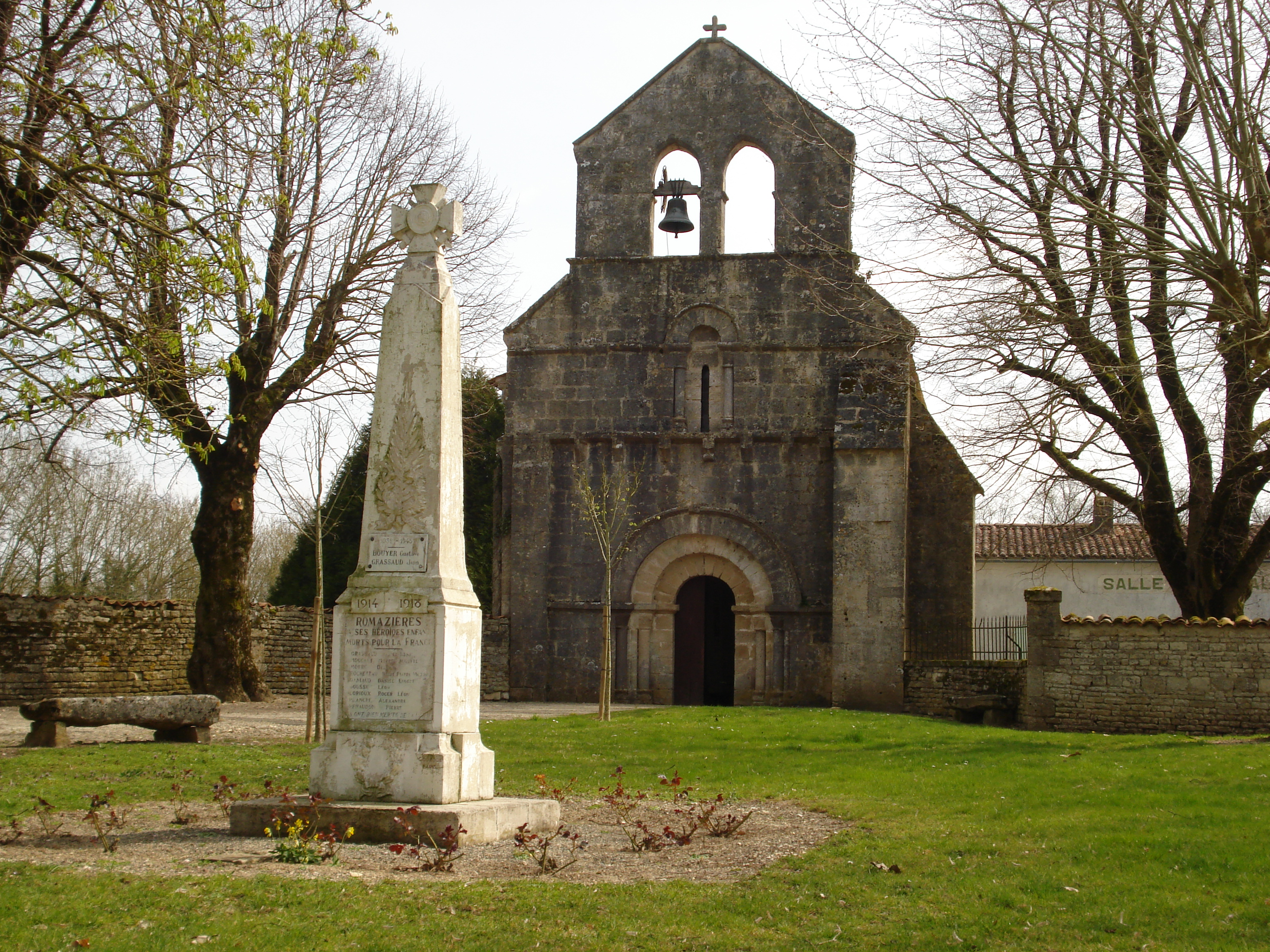 L'église, le monument aux morts et la salle municipale de Romazières